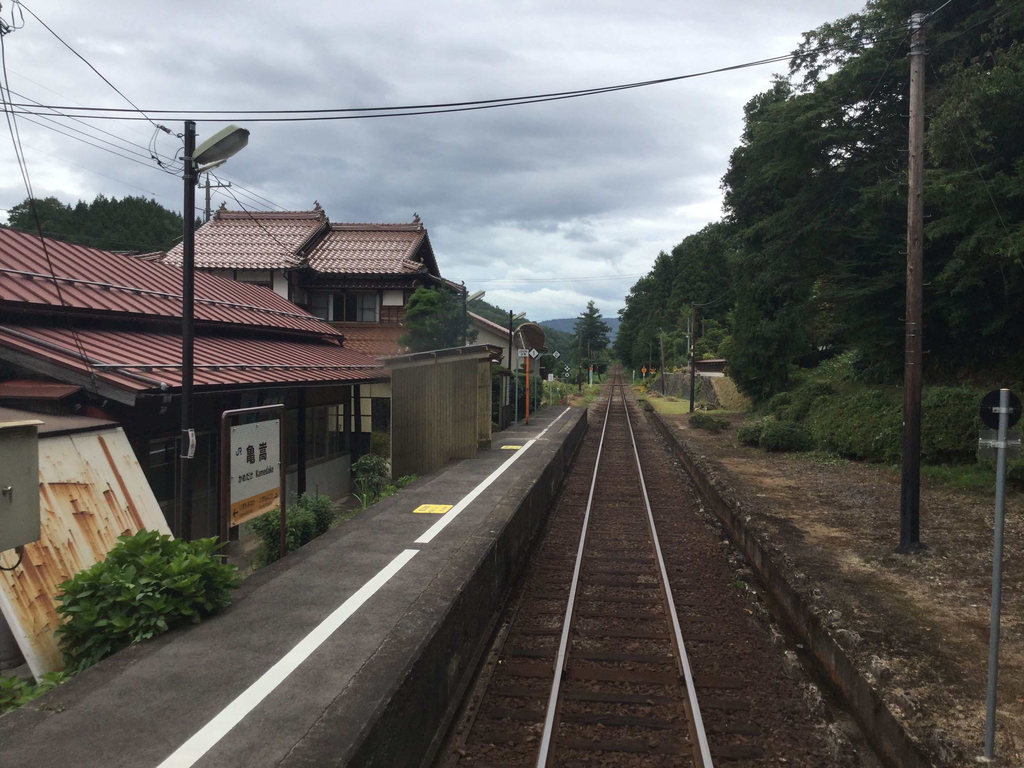 Kamedake Station (亀嵩駅)